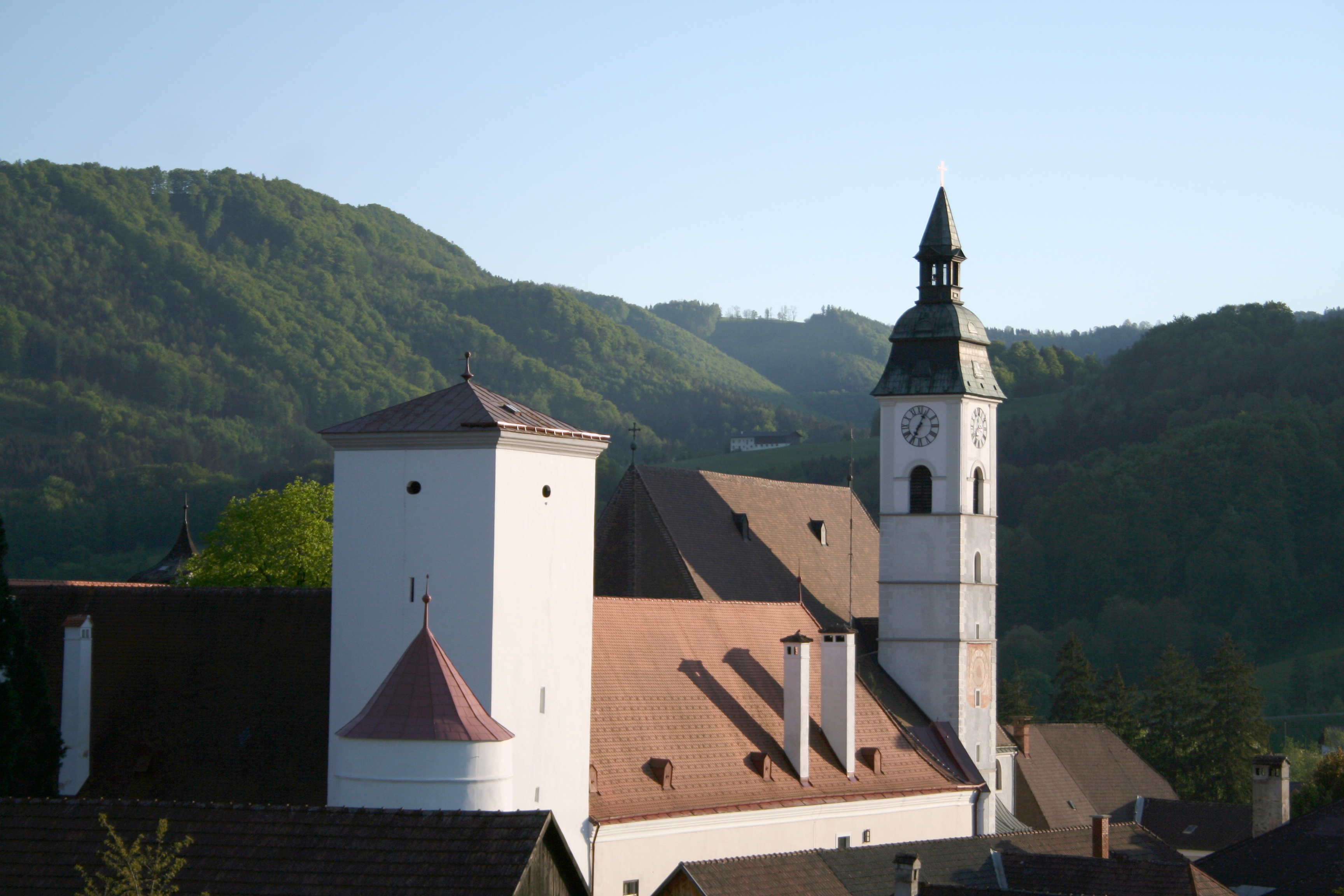 scheibbs